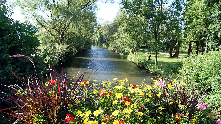 Blick auf die Hegauer Aach von der Hauptstraße in Rielasingen aus.